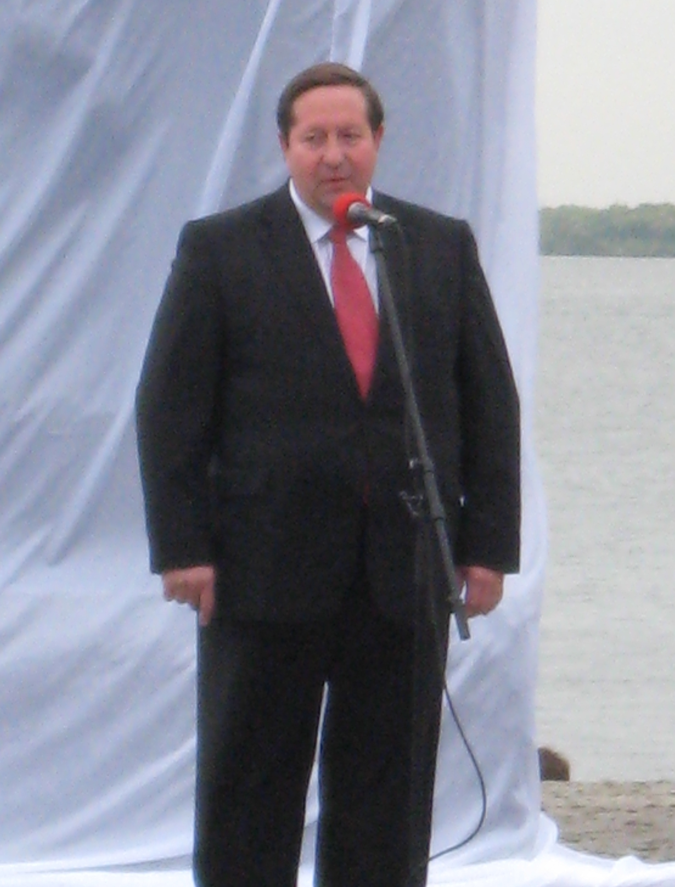 изображение открытия стелы "Город воинской славы" в Архангельске (приветственная речь губернатора Архангельской области Ильи Михальчука)